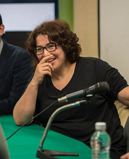 Ecos de la FIL. La escritora salvadoreña Claudia Hernandez, visita una Preparatoria de la Universidad de Guadalajara en Tonala dentro de las actividades de la 29 Feria Internacional del Libro de Guadalajara, Mexico, Jueves , Diciembre 03, 2015. ( © FIL/Melinda Llamas)